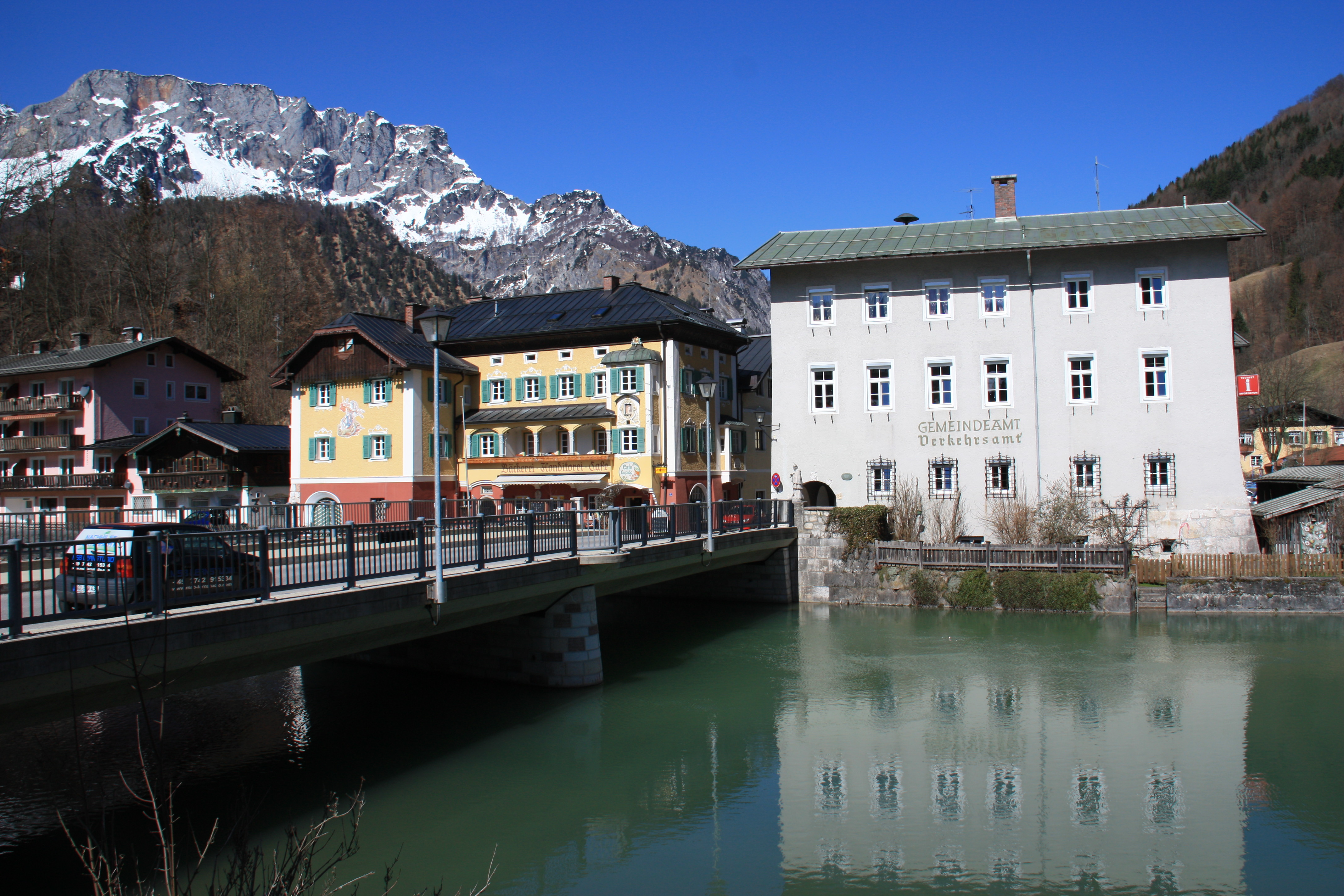 Rathaus und Berchtesgadener Ache in Marktschellenberg, im Hintergrund das Untersbergmassiv